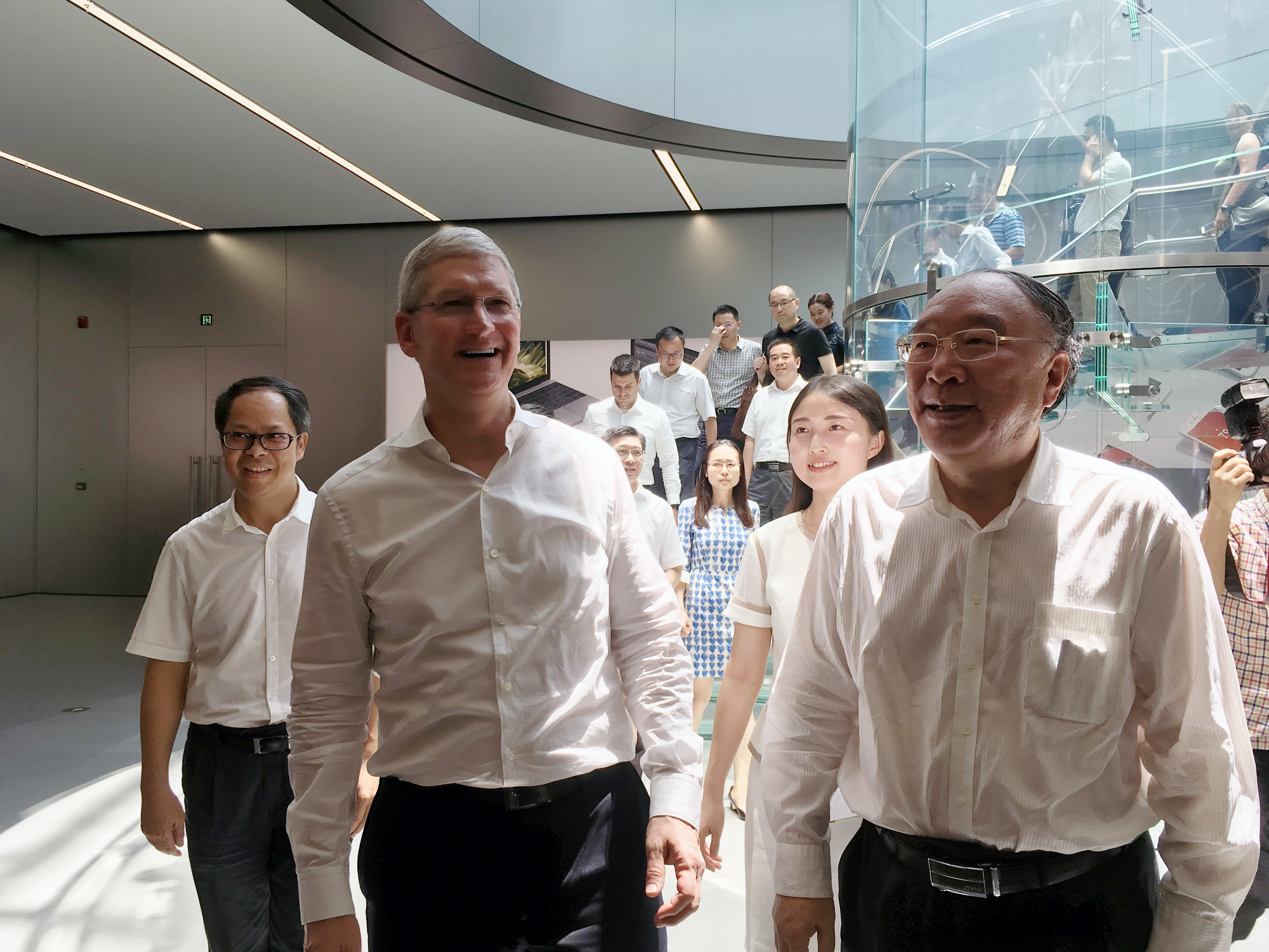 中文（中国大陆）: Tim Cook 与原重庆市市长黄奇帆在 Apple 解放碑